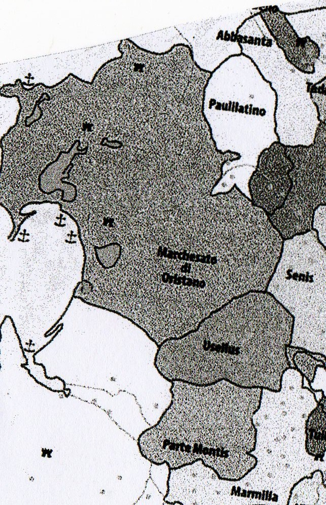 carta dell'antico Marchesato di Oristano